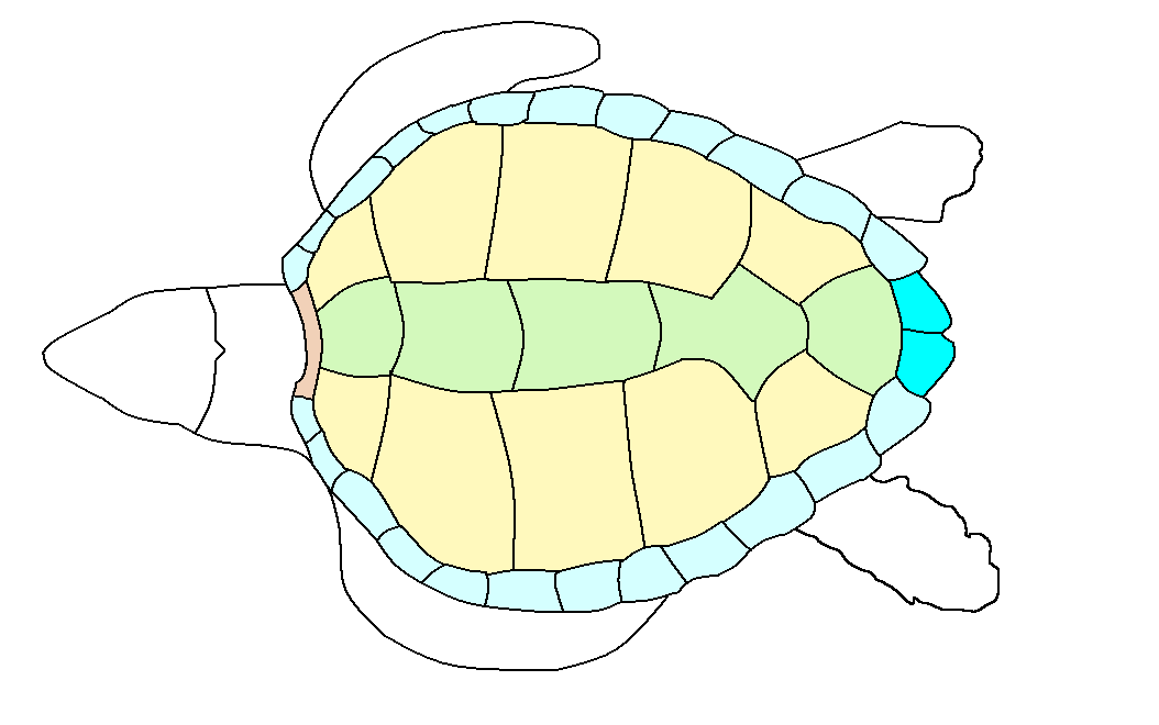 Edited version of Ab reptile 06.jpg